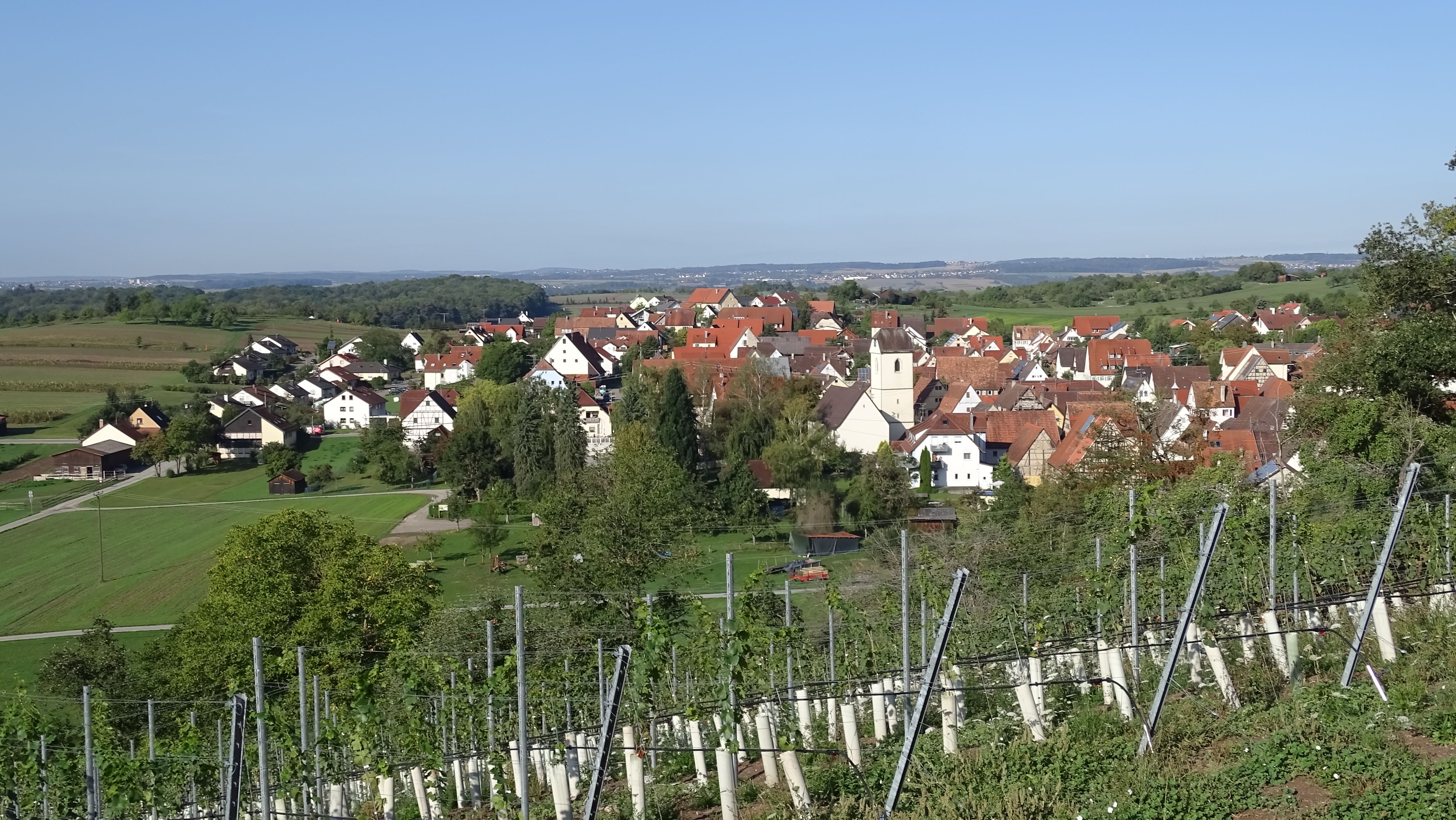 Landschaftsaufnahmen Breitenholz, Gemeinde Ammerbuch, Weinberge und Blick auf Breitenholz.